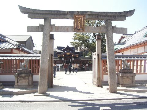 晴明神社の鳥居